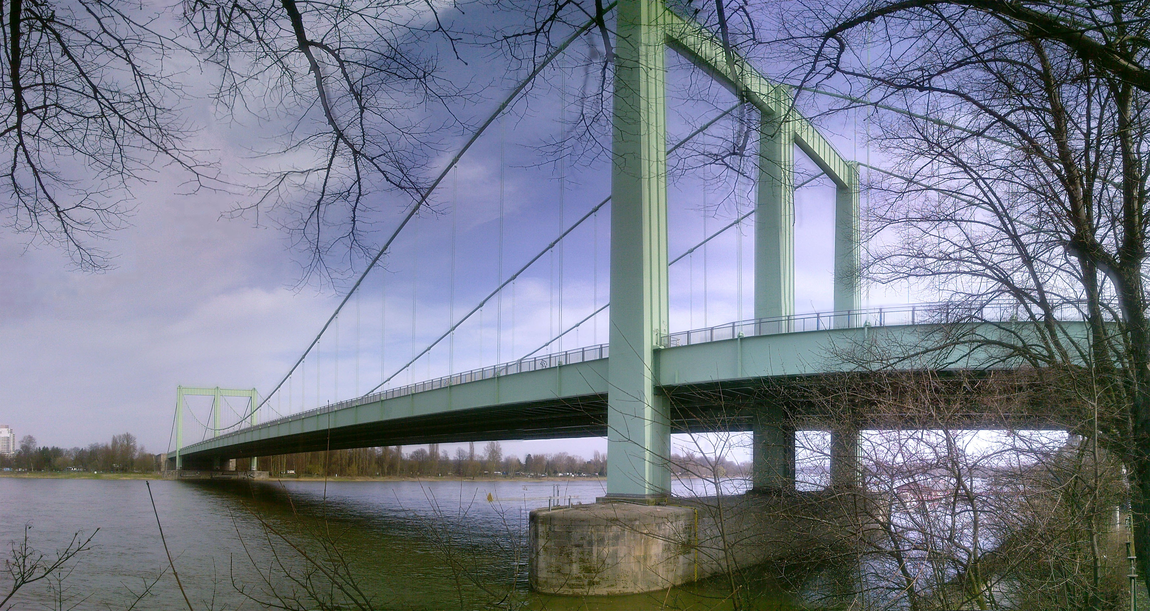 Rodenkirchener Autobahnbrücke, Köln-Rodenkirchen This is the photograph of an architectural monument. It is part of the list of cultural monuments of Köln, no. 7837